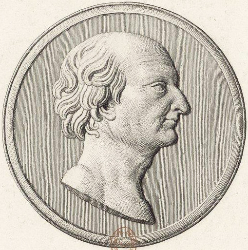 Recueil. Portraits de J. B. Louis Georges Seroux d'Agincourt (XVIIIe-XIXe s.)